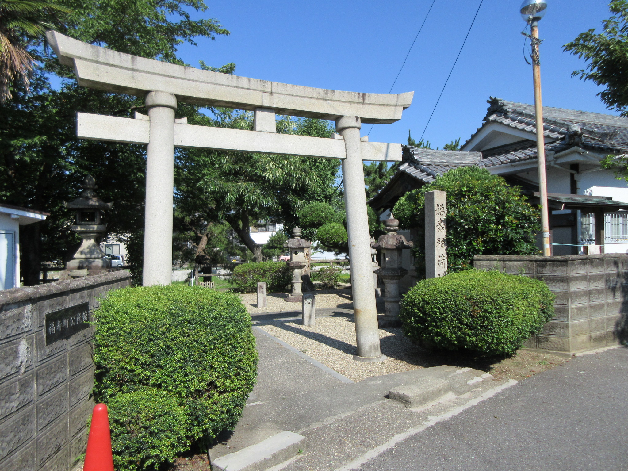 福寿稲荷神社（岡崎市福寿町）